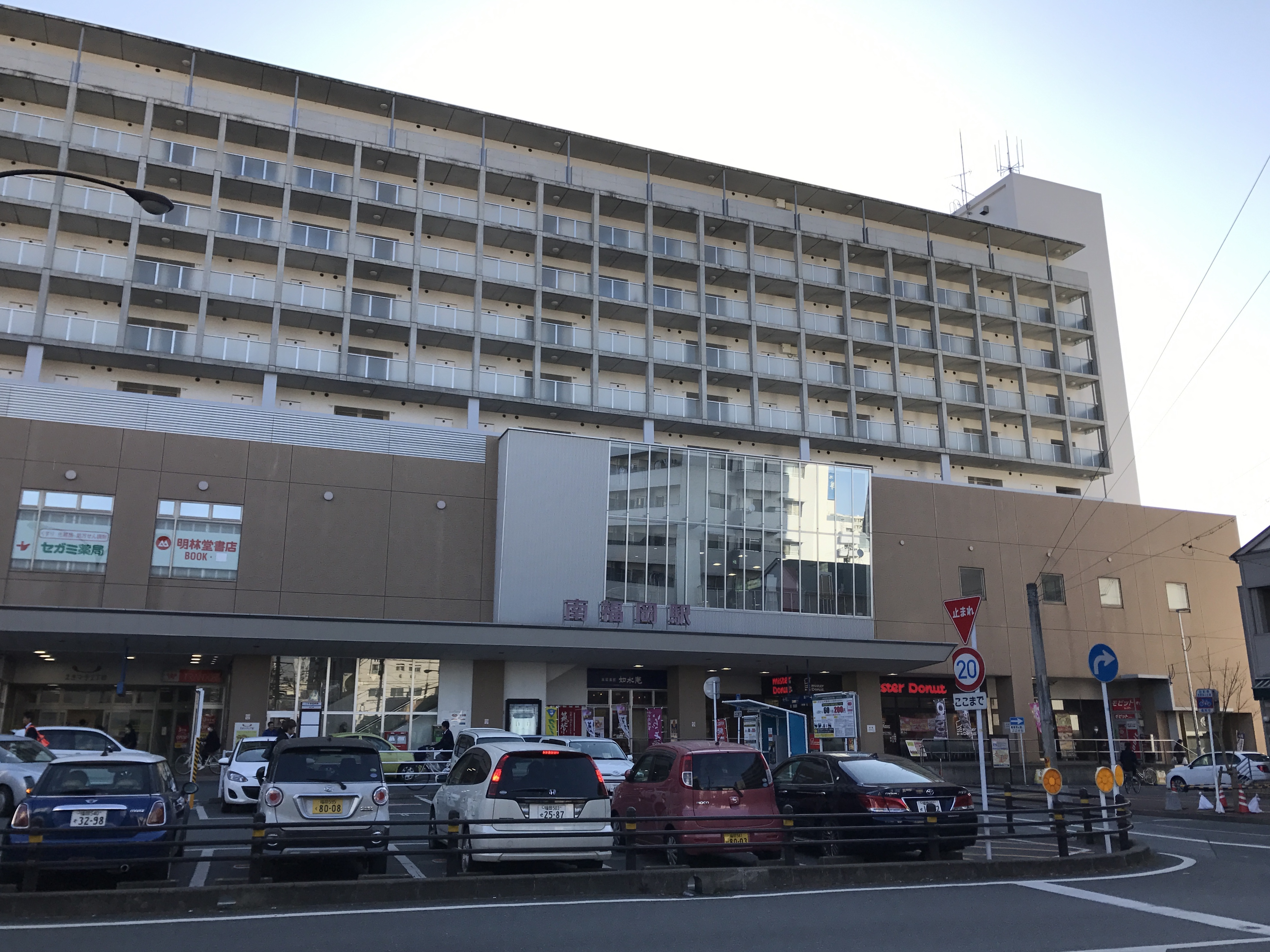 南福岡駅の駅ビル